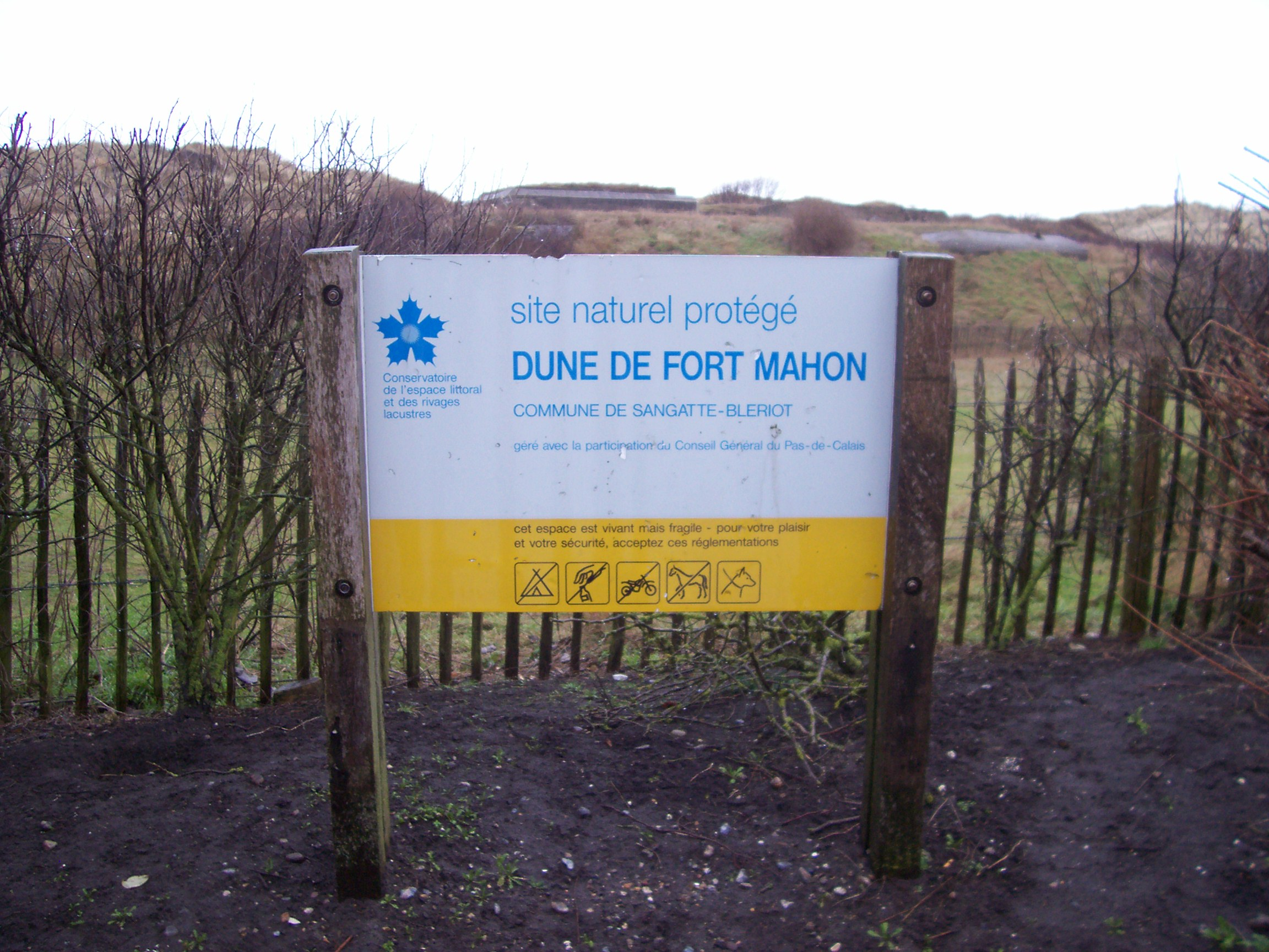 Panneau du site "dune de Fort-Mahon" à Sangatte, Pas de Calais, France.